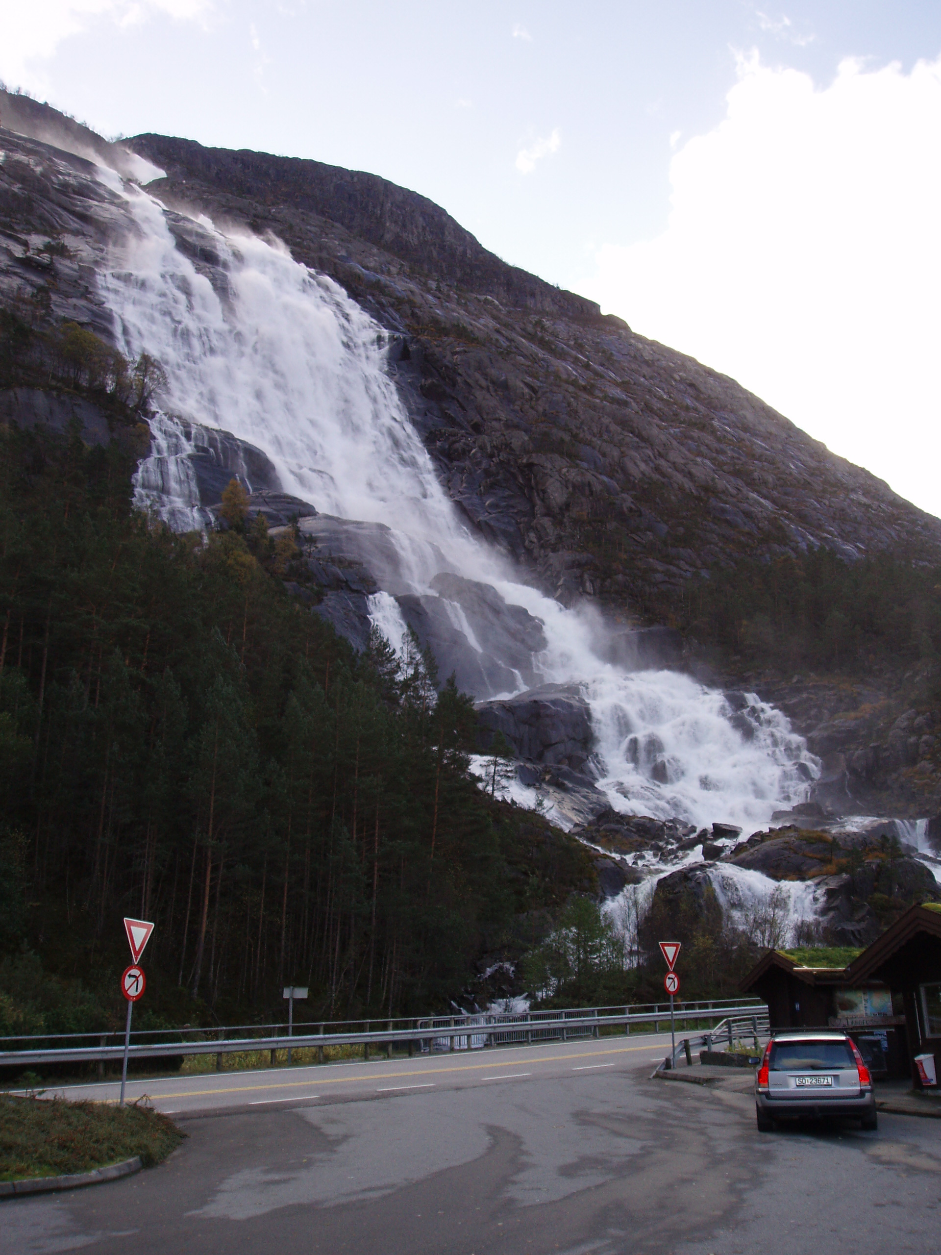 Langfossen in Åkrafjorden